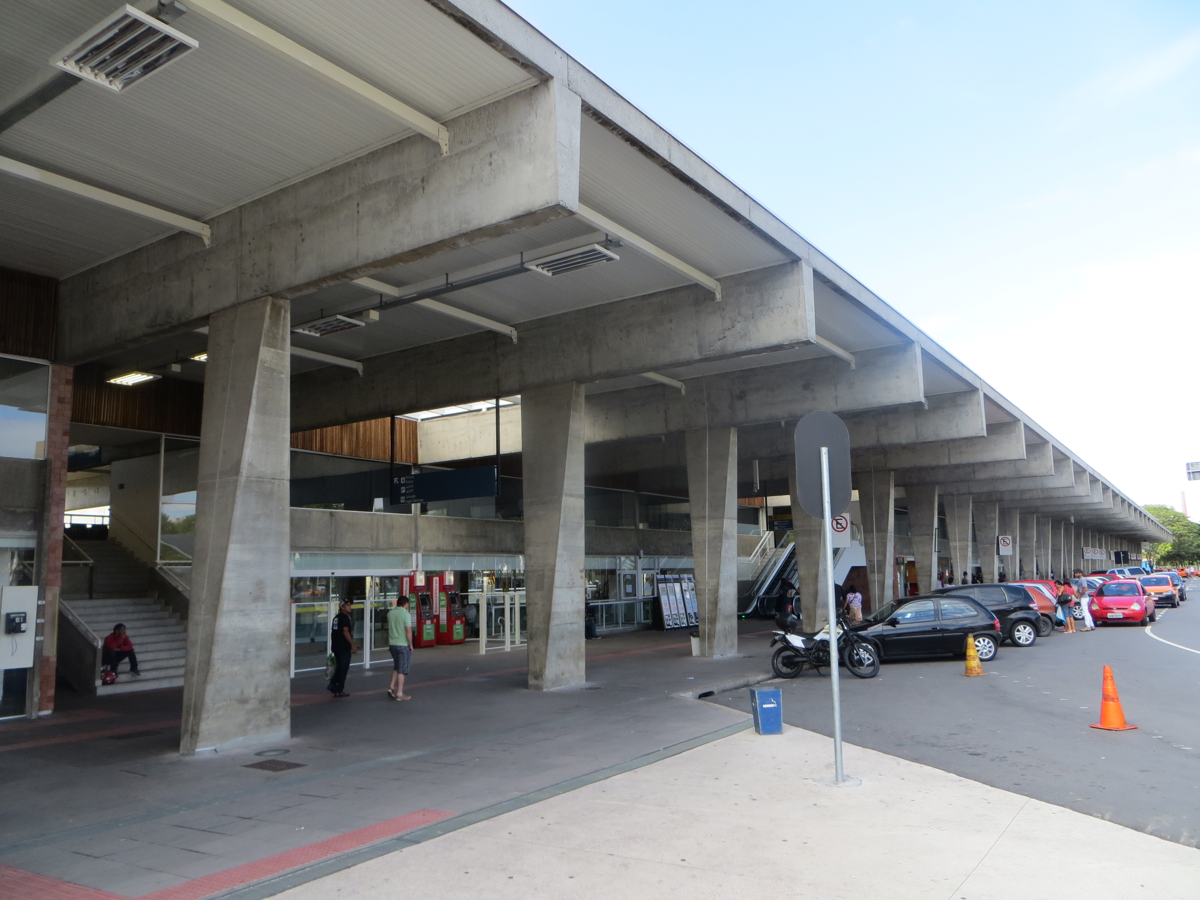 Estação Rodoferroviária de Curitiba, capital do estado brasileiro do Paraná.